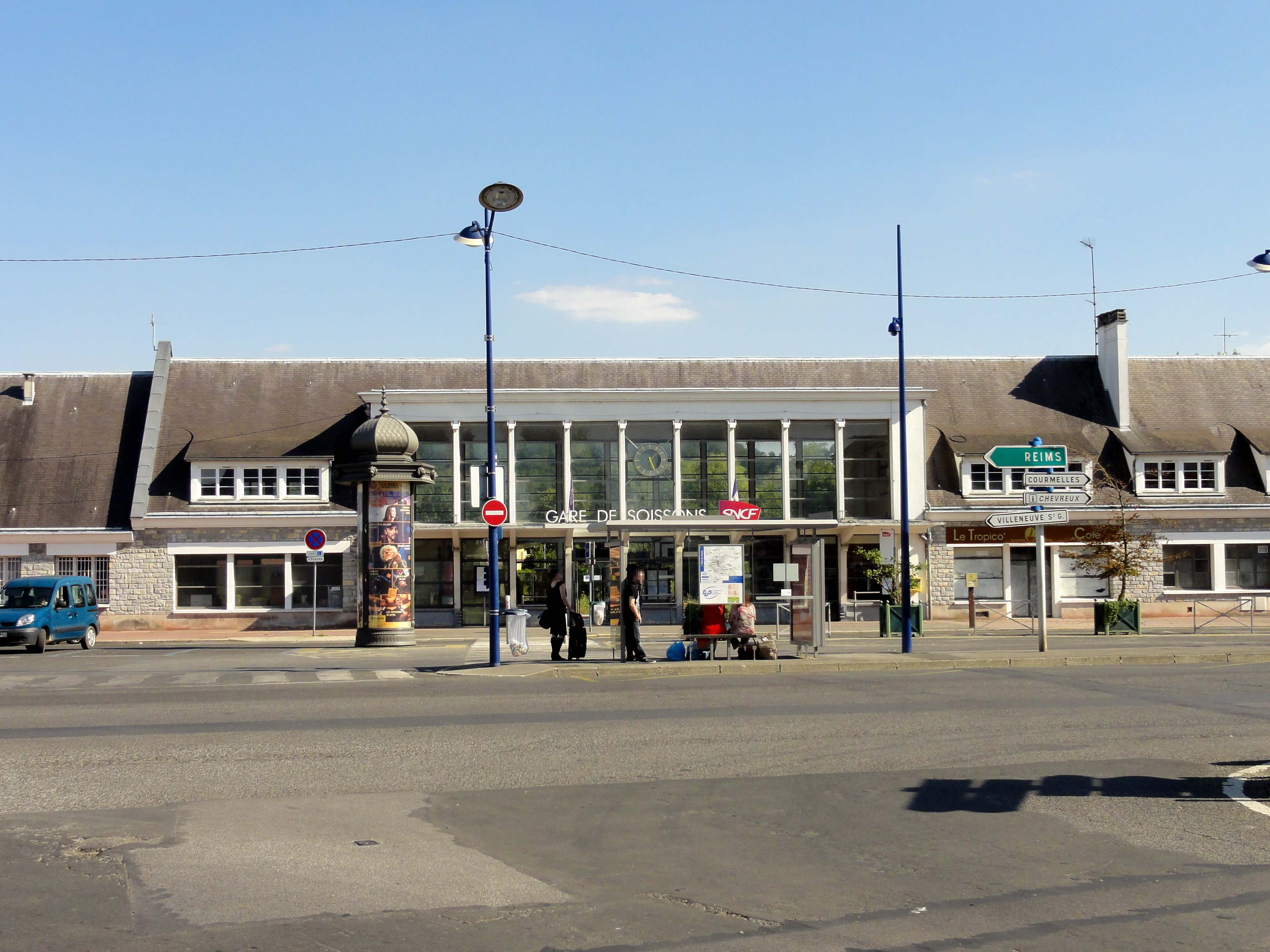 Gare de Soissons, côté ville.